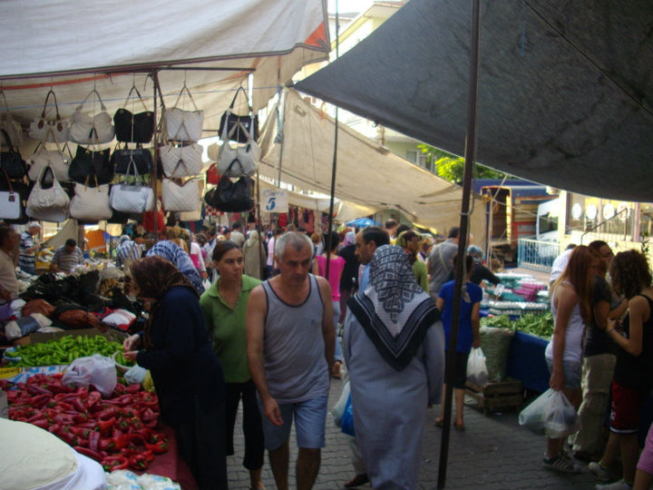 Пазар в Джихангир махала - квартал "Авджълар"